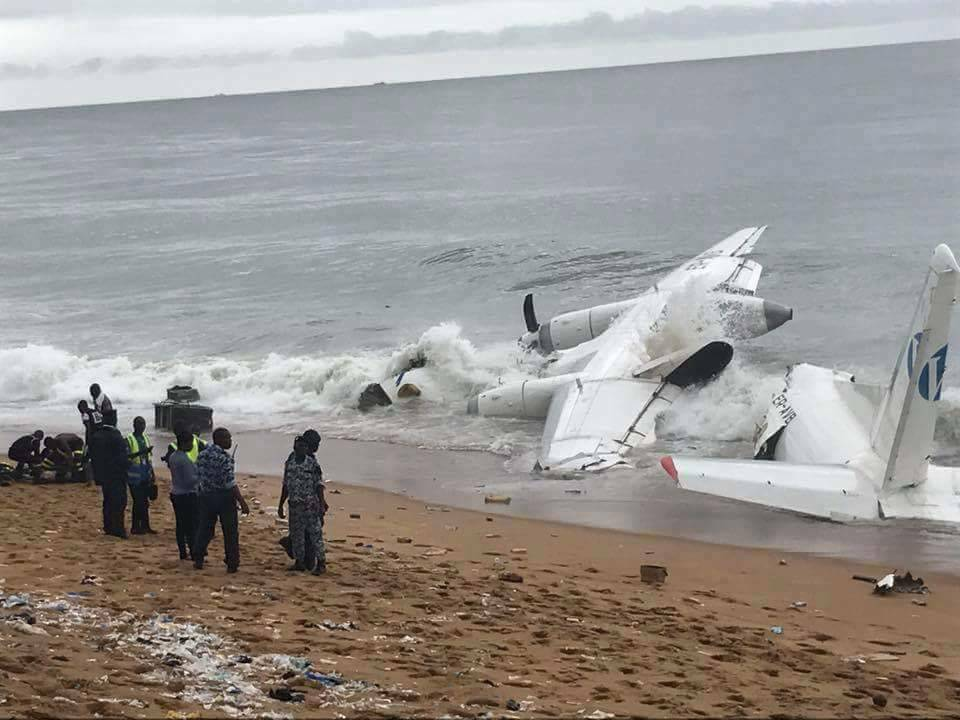 L’épave d’avion coupée en deux au bord de la mer au Port Bouet, au large d’Abidjan, Côte d’ivoire, 14 octobre 2017. (VOA/Narita Namasté)